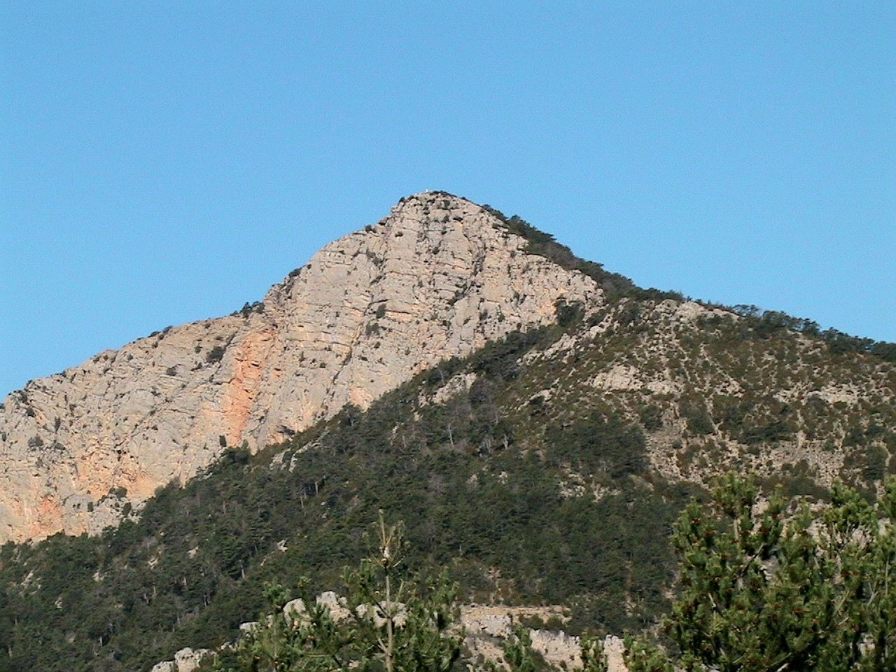 El Pic de Turp des dels camps del Tilló de Llinars. Fígols i Alinyà (Alt Urgell - Catalunya)